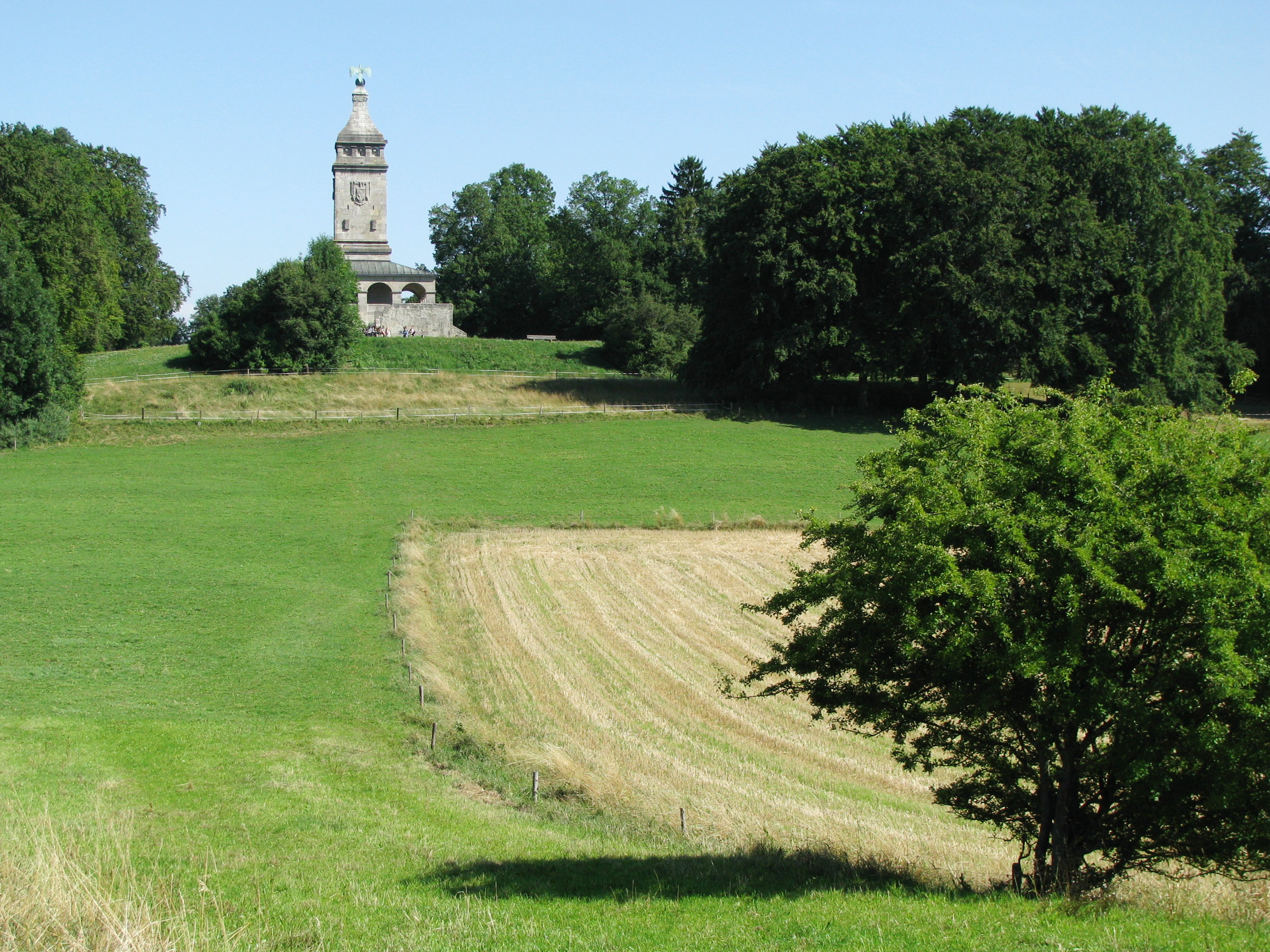 Bismarckturm bei Assenhausen